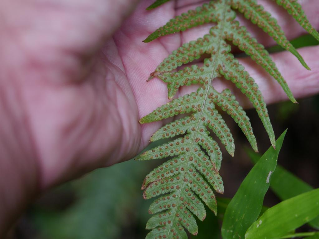 Thelypteris decursive-pinnata：ゲジゲジシダ 2014/09/15 和歌山県田辺市：Tanabe City. Wakayama Pref. Japan